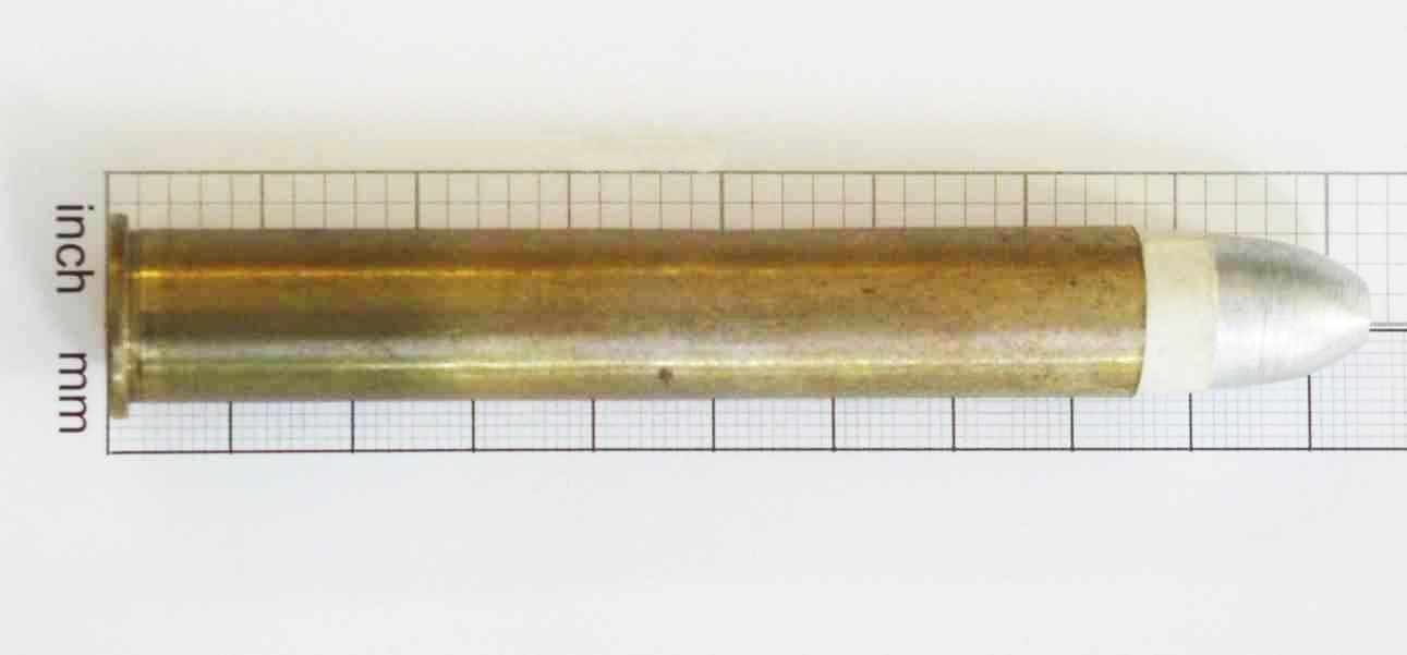 Patrone .50-140 Sharps